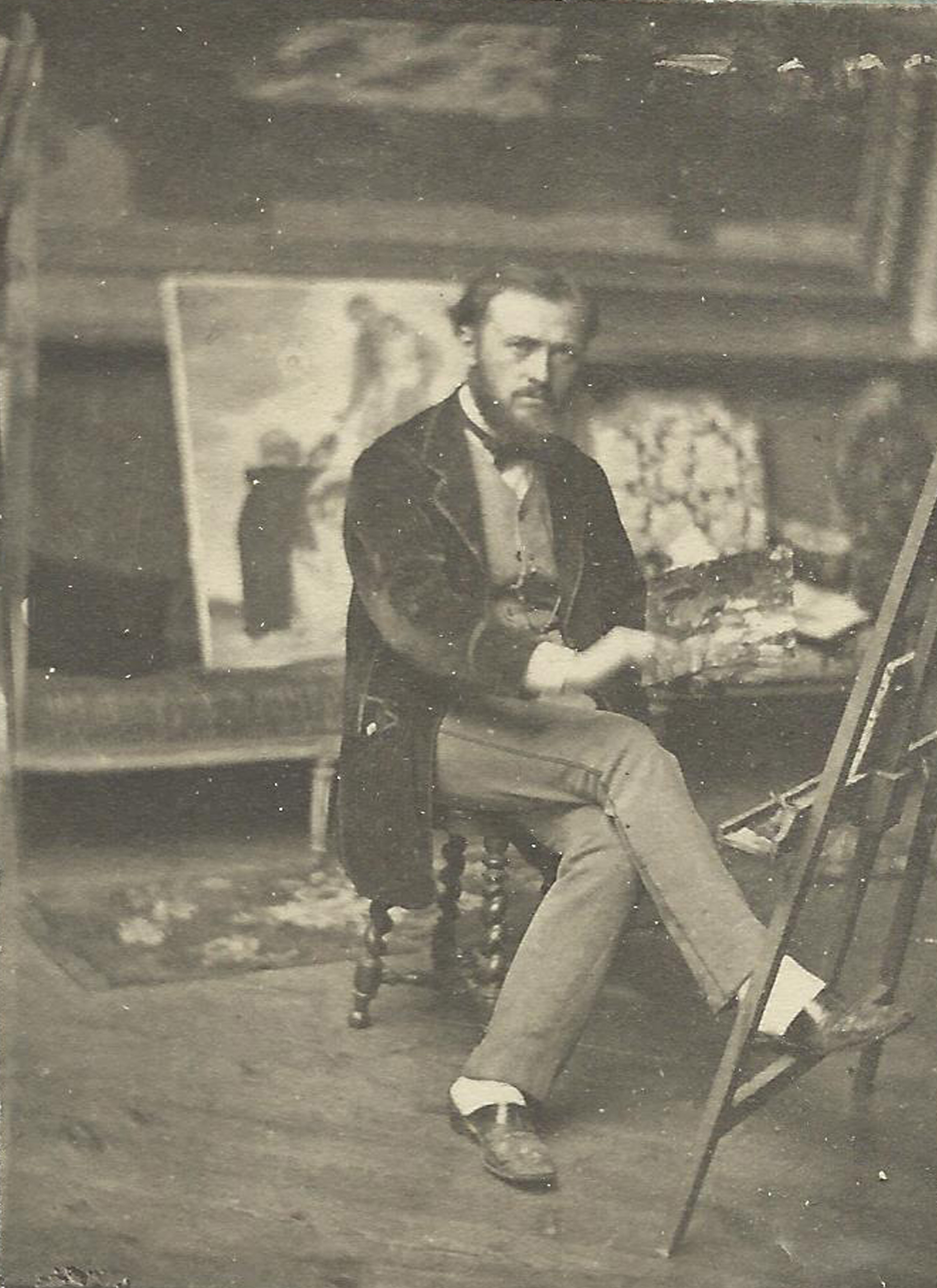 Portrait photographique du peintre rouennais Gabriel Martin (1842-1922), jeune, dans son atelier.